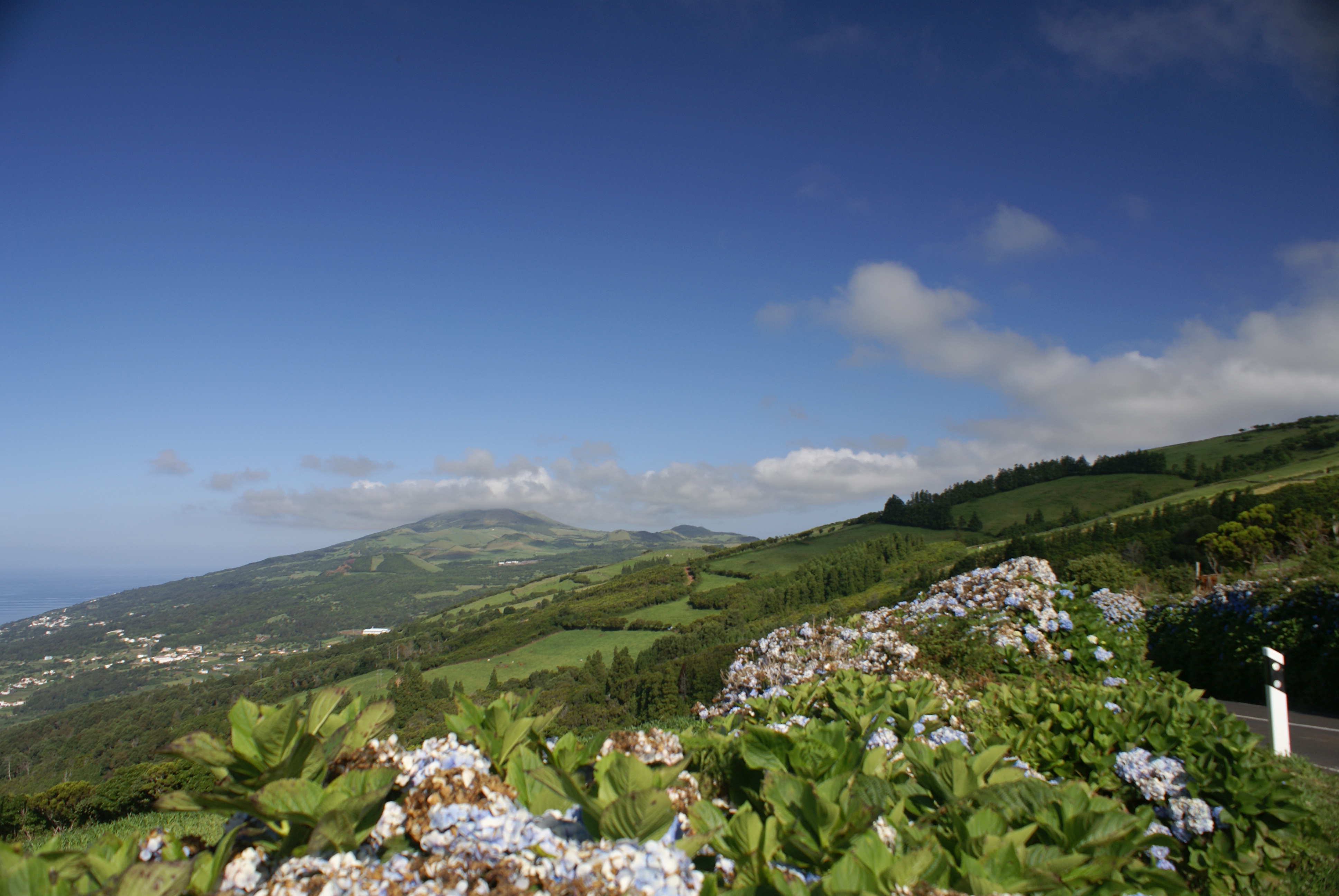 Montanhas do Complexo Vulcânico do Topo, Topo, Vila da Calheta, ilha de São Jorge, Açores